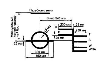 Разметка грузовой марки